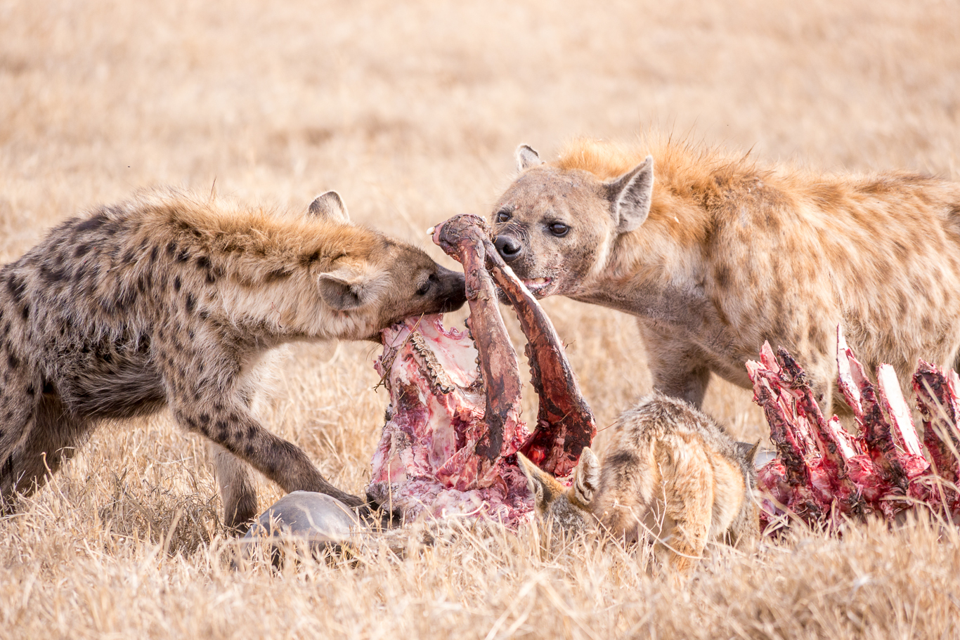 Ngorongoro, Tanzania